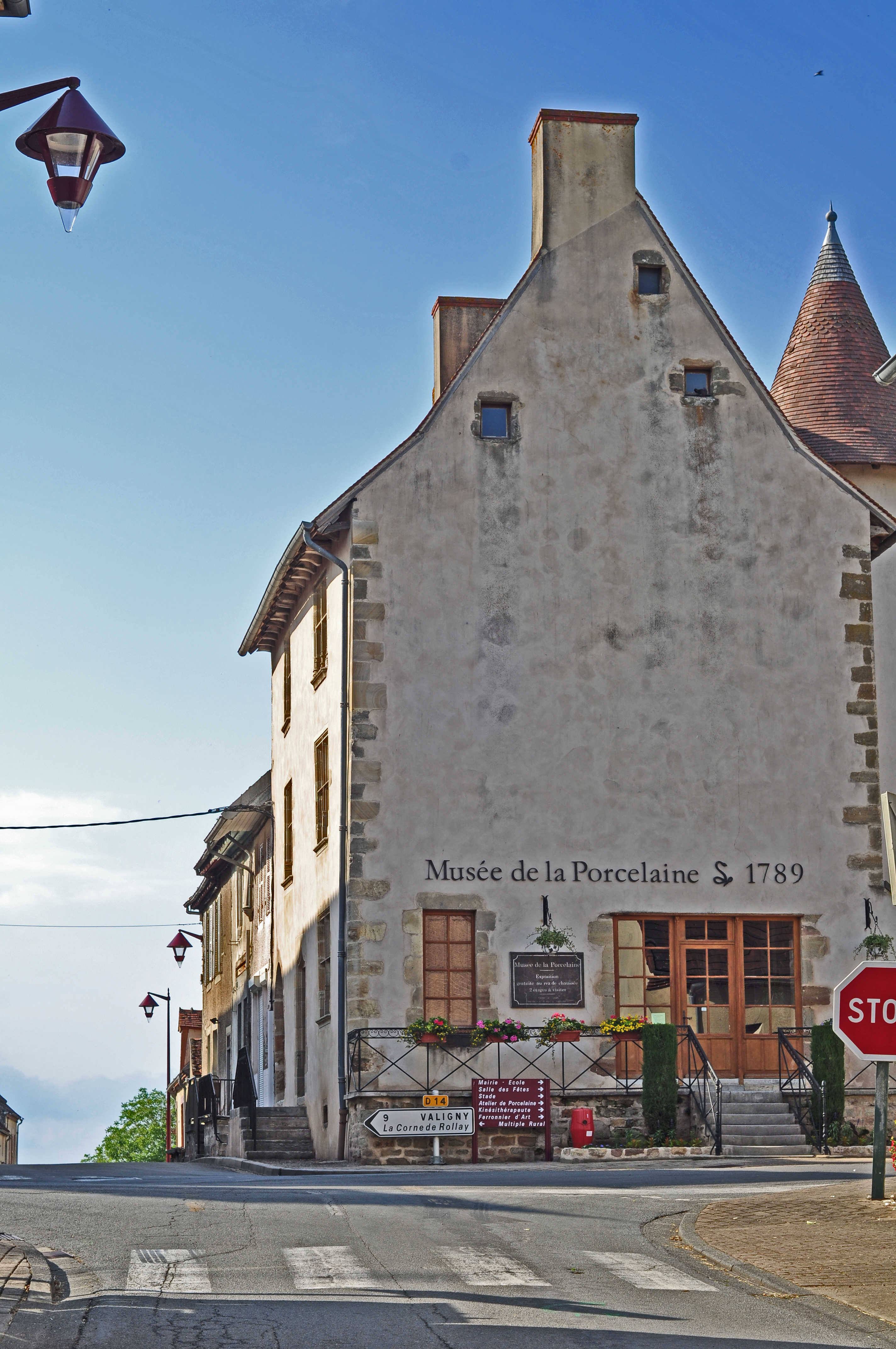 Ce musée se trouve dans le bourg de COULEUVRE .